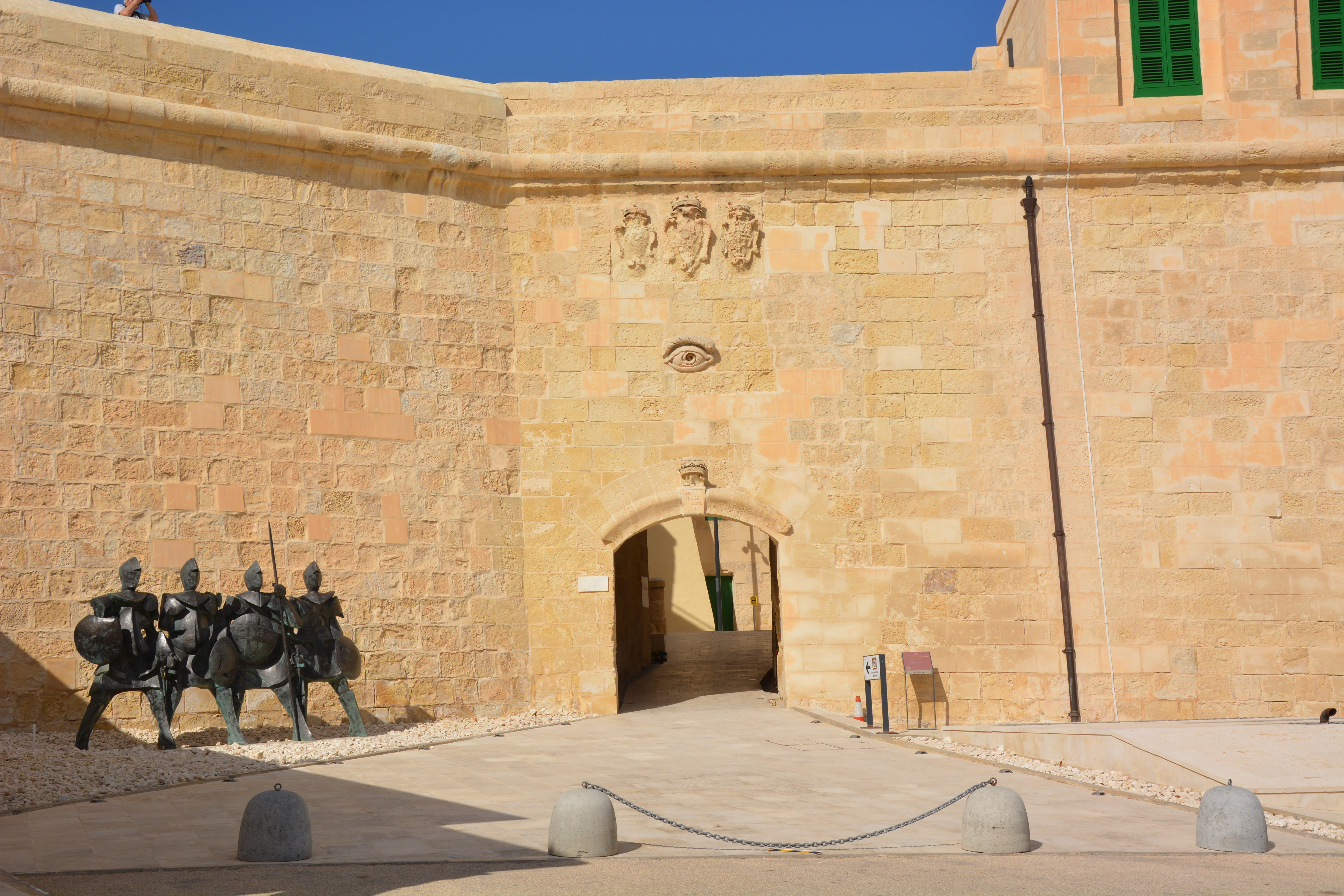 Porte intérieure du Fort Saint Elme, La Valette, Malte